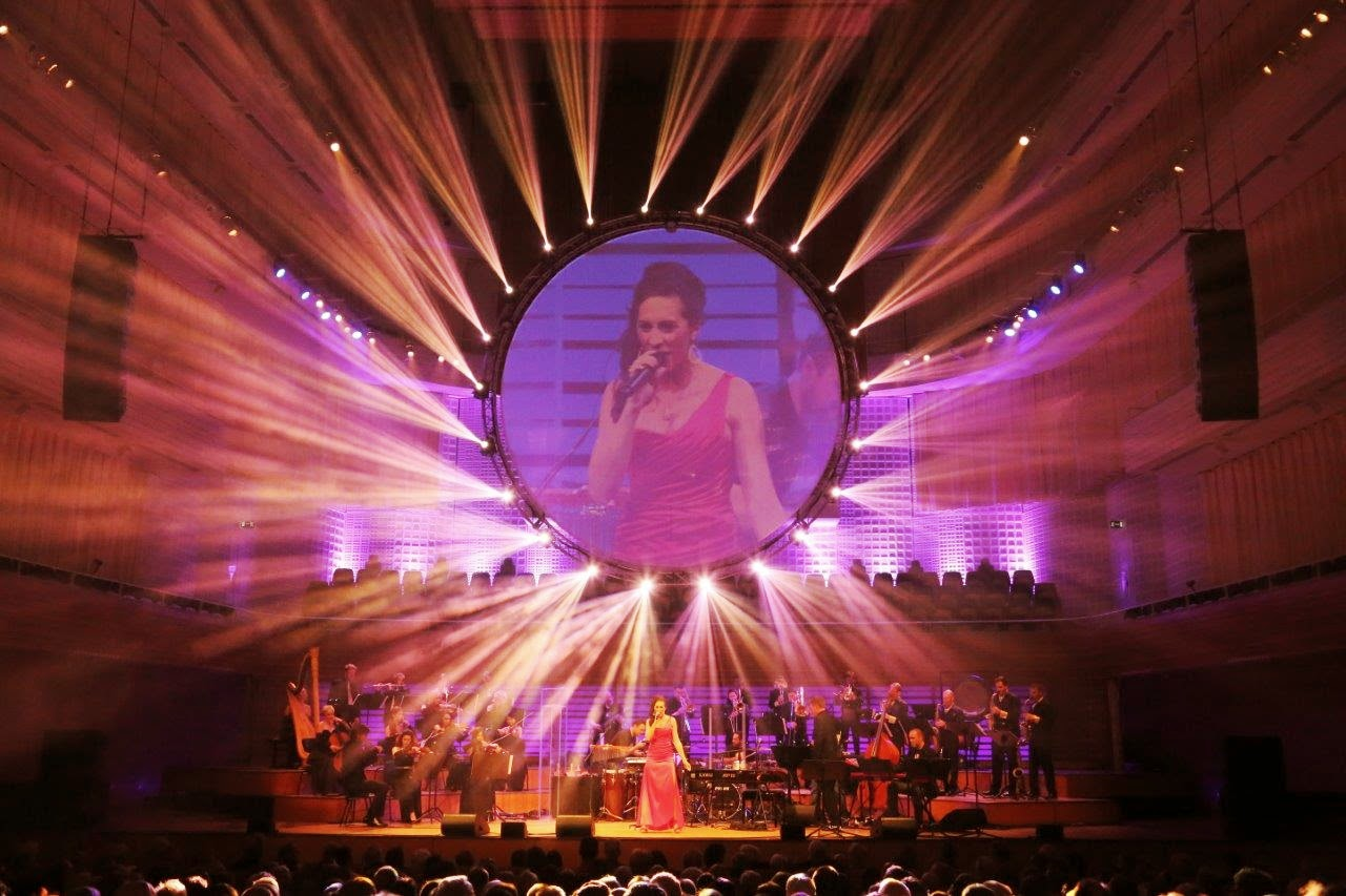 Das Christoph Walter Orchestra präsentiert alljährlich die Entertainment-Gala am World Band Festival im KKL Luzern.